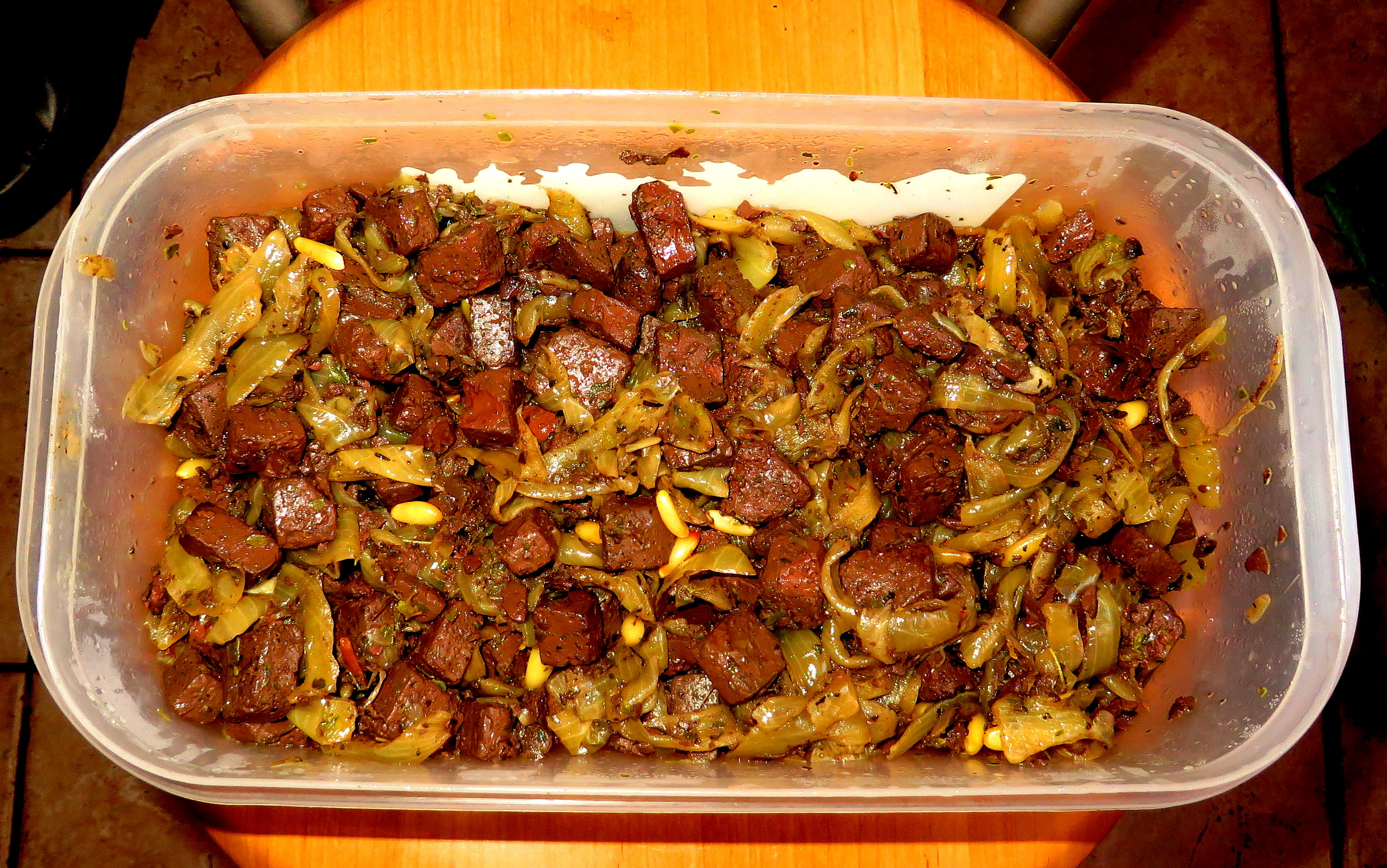 Sangre con cebolla caramelizada y piñones